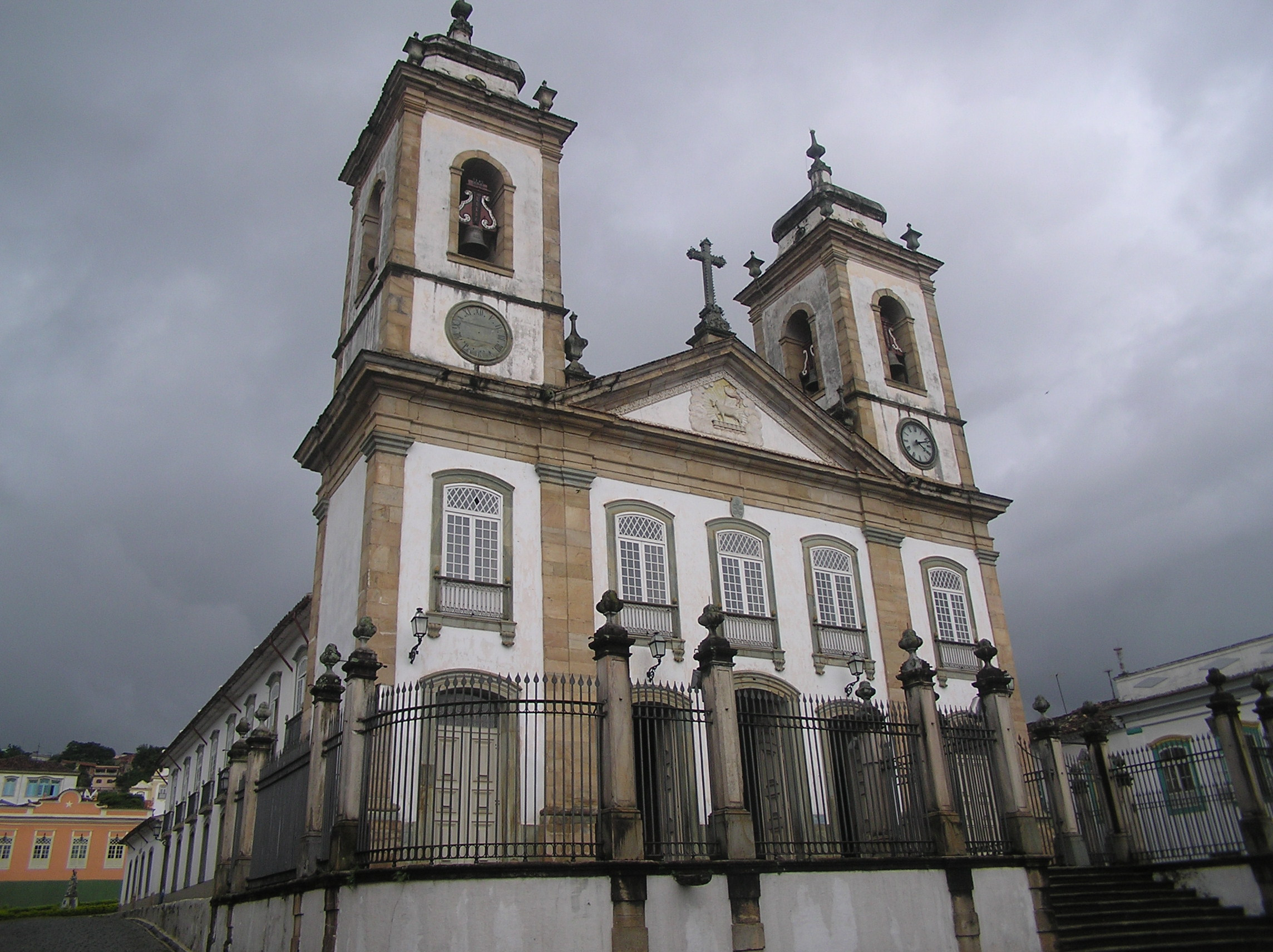 Cathedral, the Basilica of Nossa Senhora do Pilar in São João del Rei.